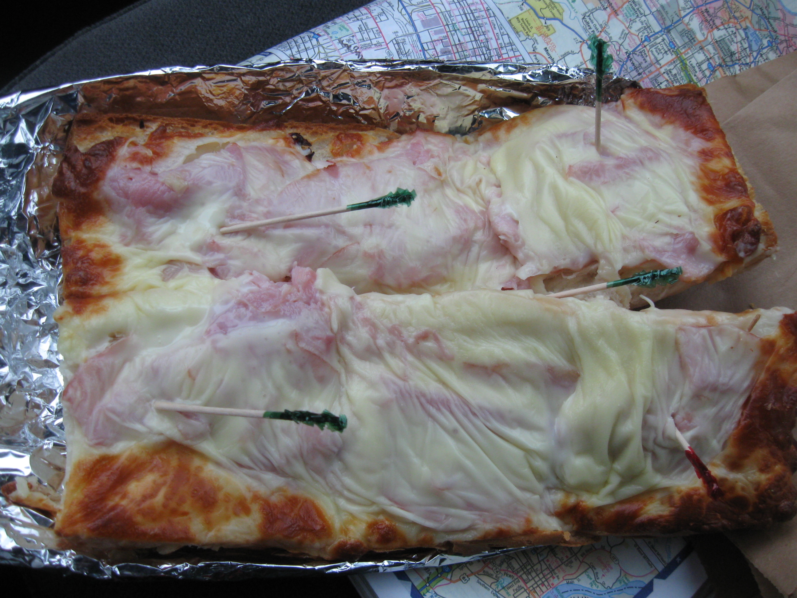 Gerber sandwich from Ruma's Deli.